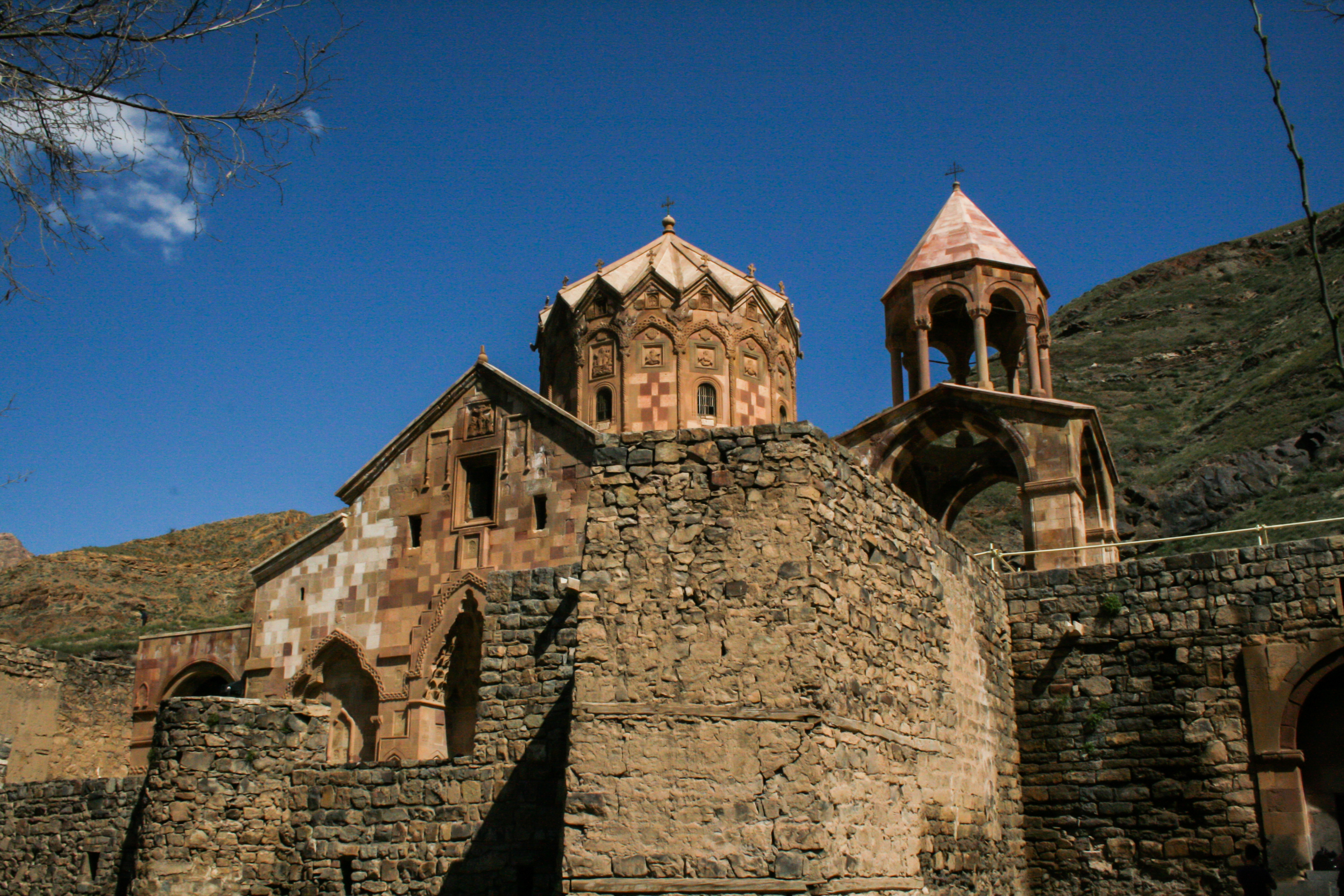 کلیسای استفانوس مقدس